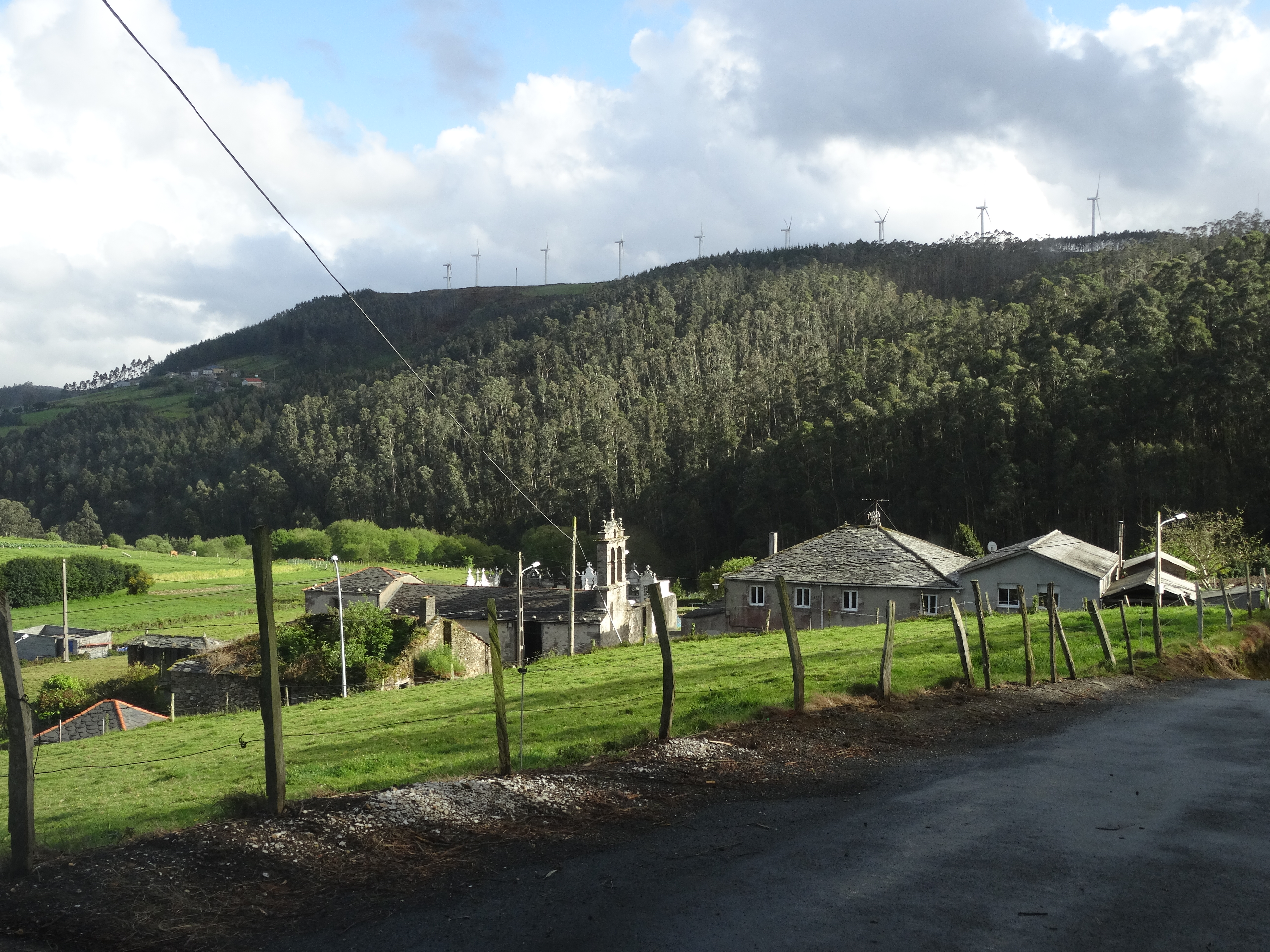 Ver título.